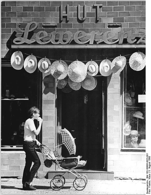 Berlin, Münzstraße, Straßenszene Zentralbild Franke ste 5.8.1968 Berlin: "Mexikanische Geschäftsauslagen" präsentiert dieses Hutgeschäft in der Berliner Münzstraße, inspiriert von den bevorstehenden olympischen Sommerspielen.